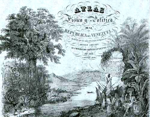 Portada del "Atlas físico y político de Venezuela", de Agustín Codazzi. Dibujo de Carmelo Fernández, grabado por Thierry, París, 1840. Codazzi en Venezuela : geógrafo y militar, gobernante y fundadorPor: Cardozo Galué, Germán Biblioteca Luis Angel Arango